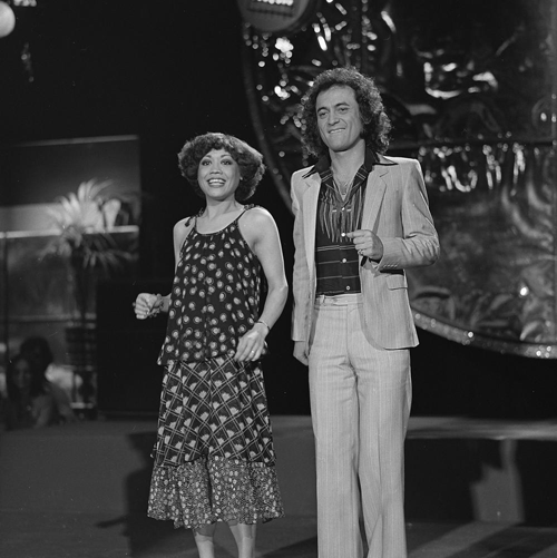 Rosy & Andres in het Nederlandse televisieprogramma Kwistig met muziek in 1977